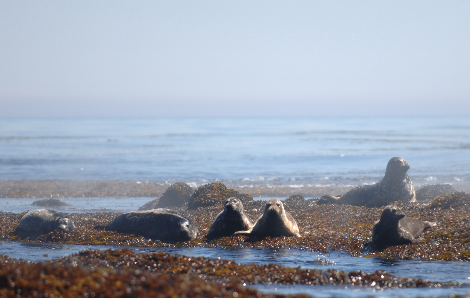 Phoca vitulina stejnegeri